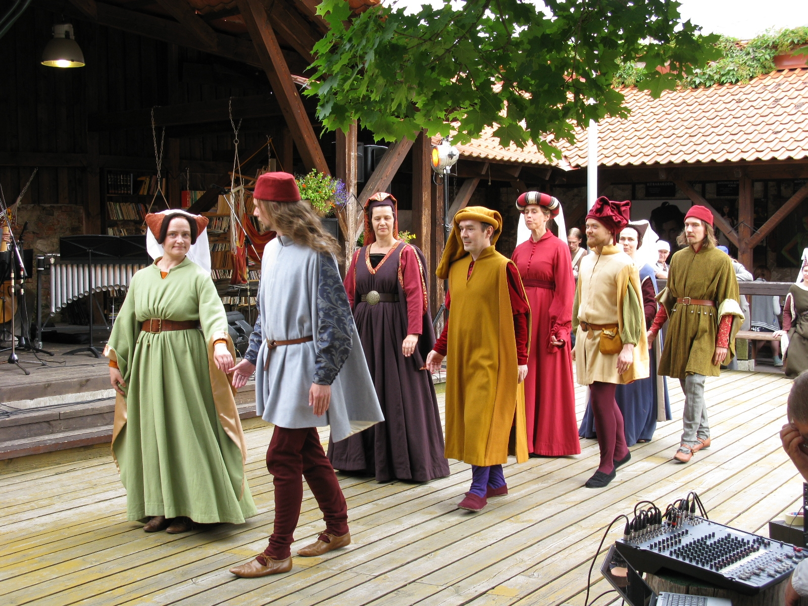 Tartu vanatantsuansambel Saltatriculi Antoniuse õues Tartu hansapäevadel, 20. juuli 2012. Foto: Oop.